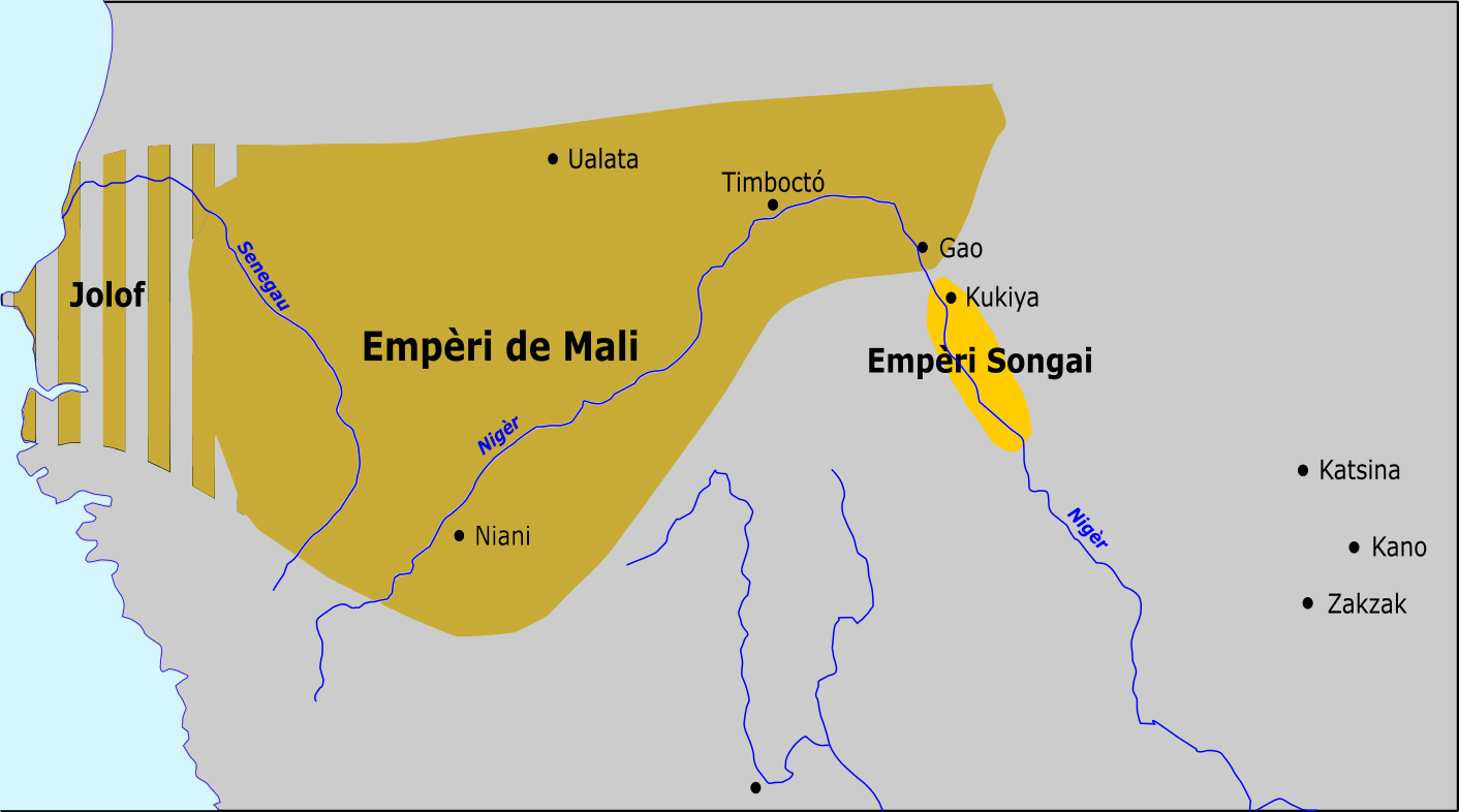 Empèri de Mali entre lei sègles XIII e XIV.